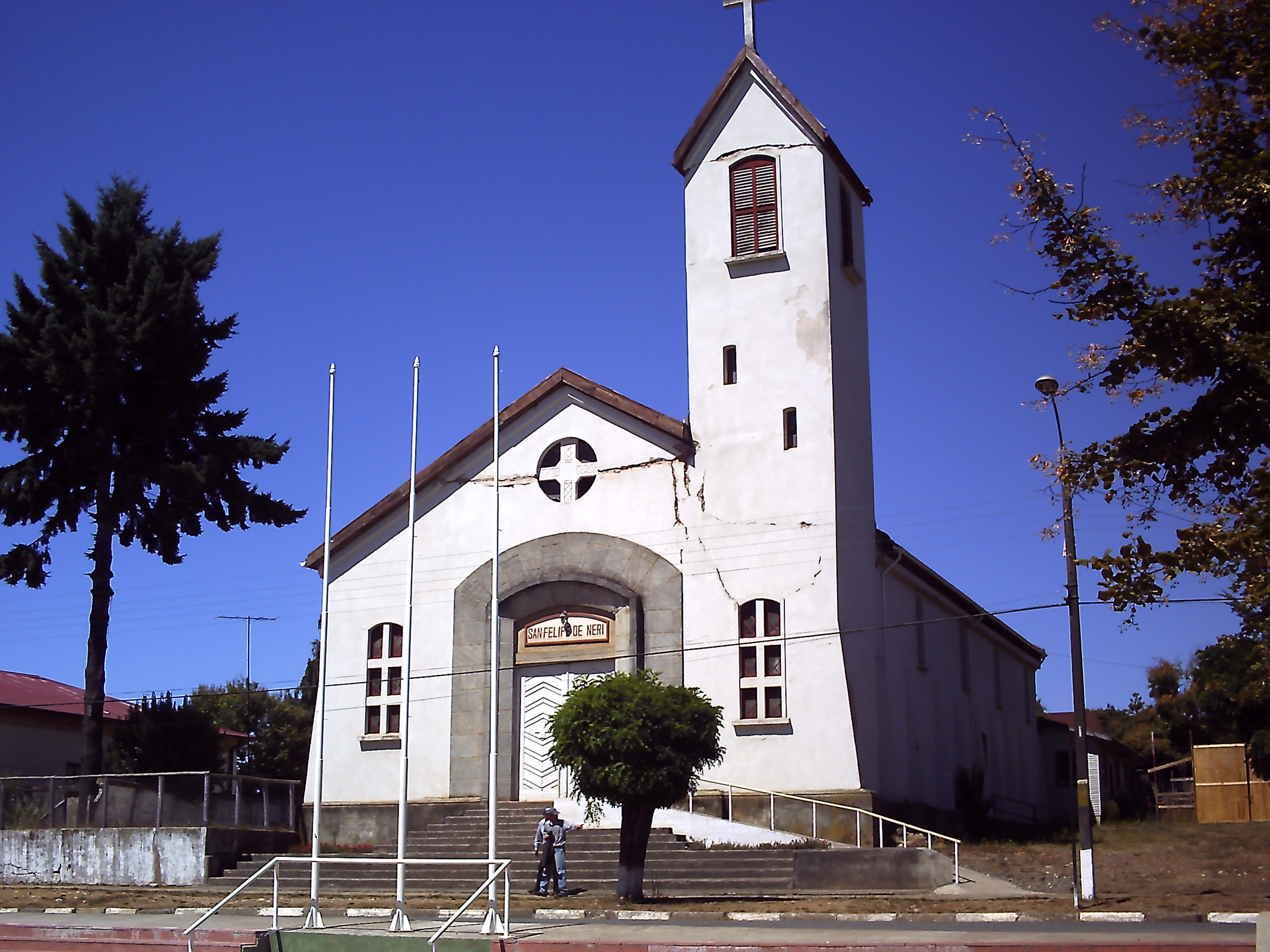 Iglesia San Felipe de Neri (febrero 2011), Capitán Pastene